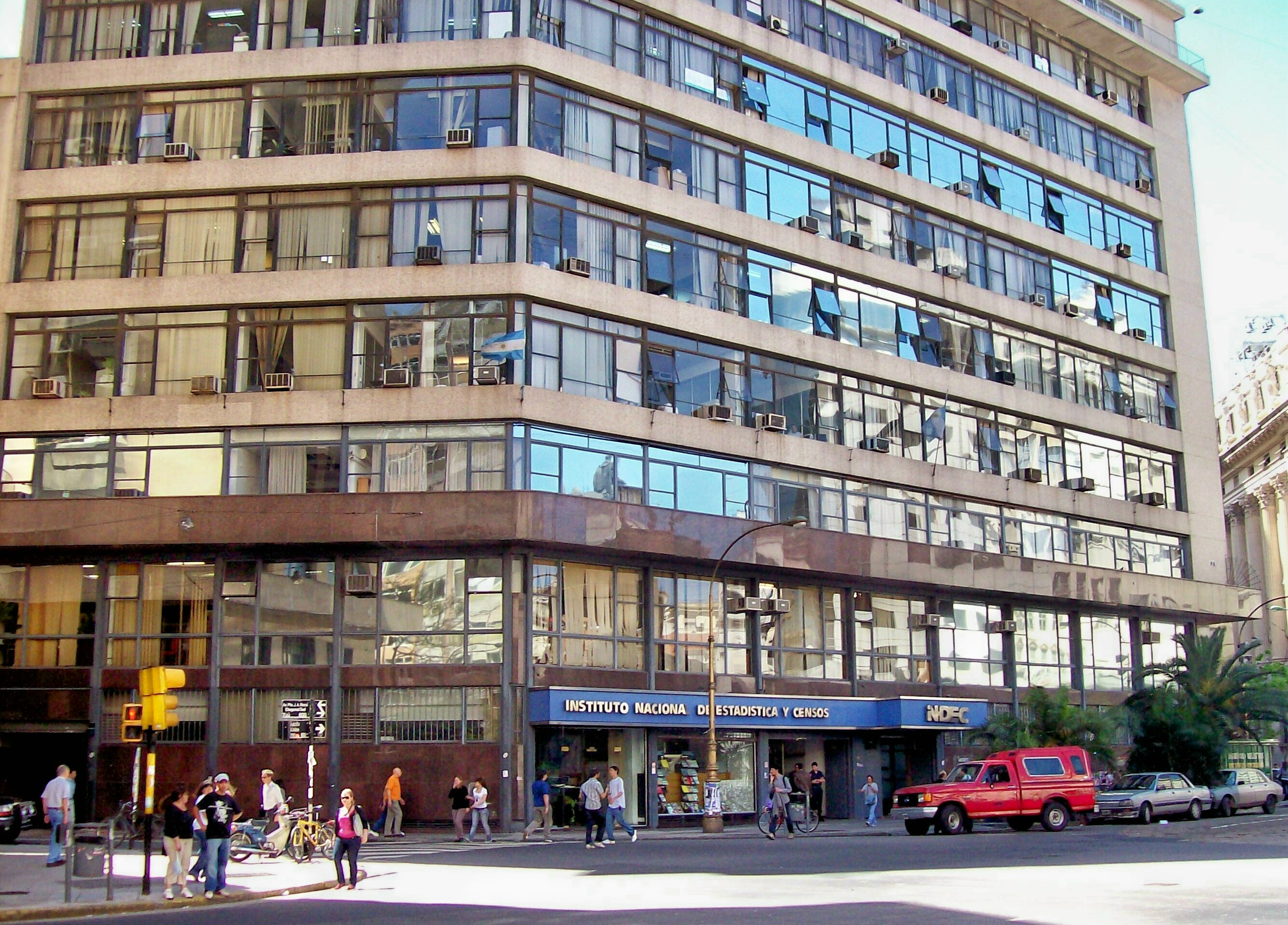 Edificio del Instituto Nacional de Estadísticas y Censos de la Argentina, proyectado por Arturo Dubourg e inaugurado en 1956 para el Ministerio de Trabajo. Situado en Av. Julio A. Roca 609, Ciudad de Buenos Aires.